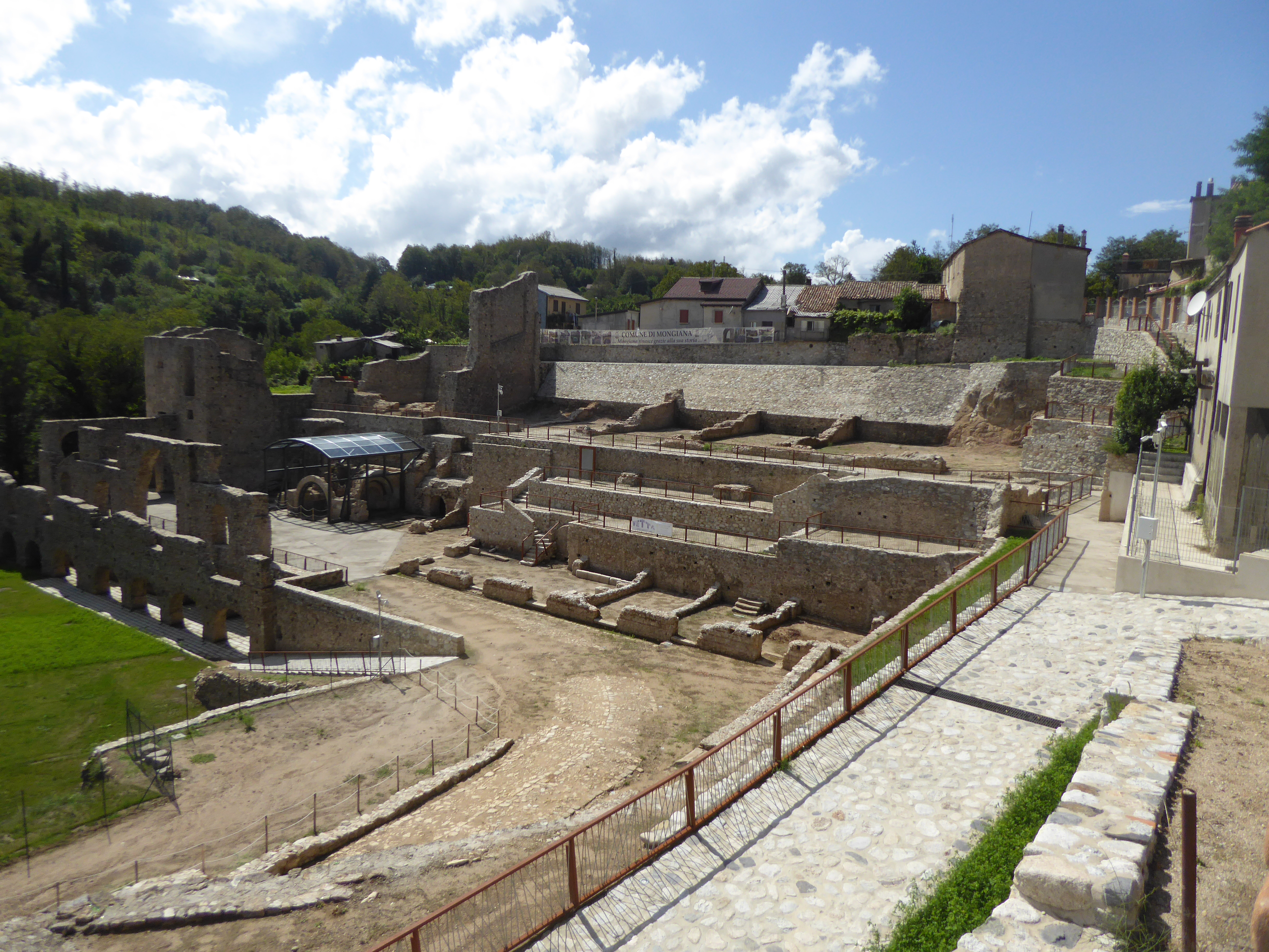 Resti fonderia di Mongiana (2018)